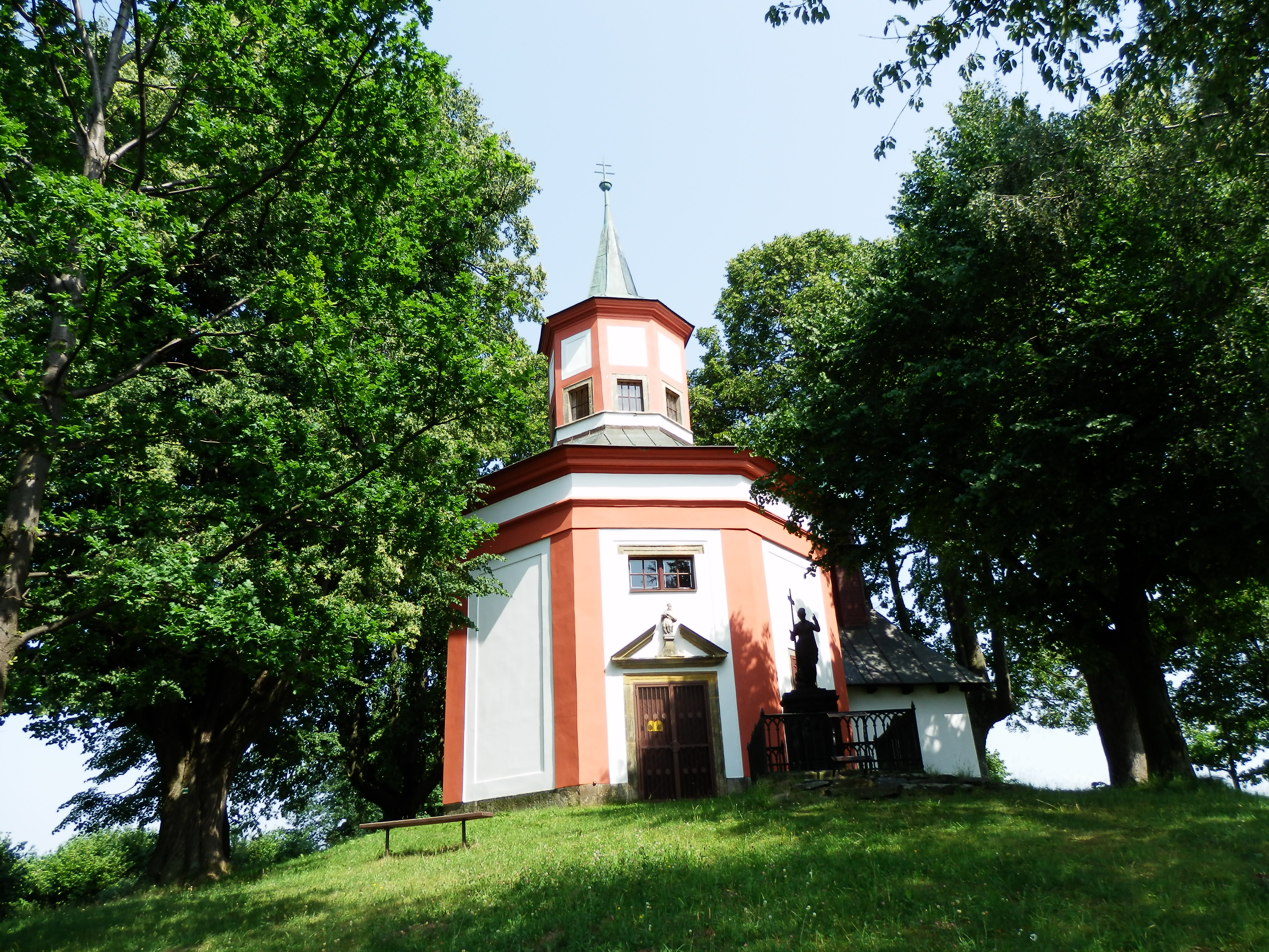 Kaple sv. Jana Nepomuckého (Hartmanice), na návrší nad vsí, Hartmanice